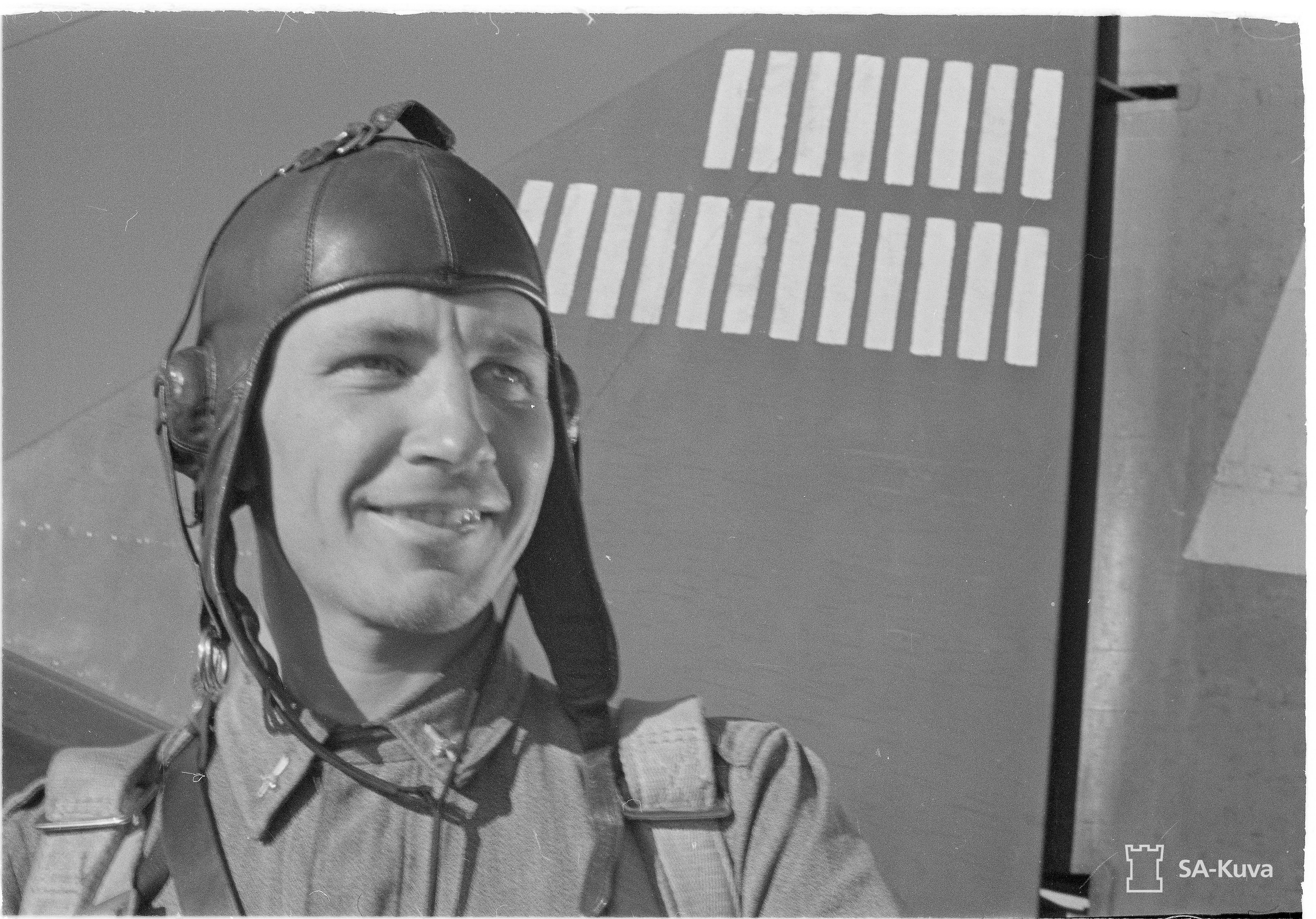 Ilmari Juutilainen 26.6.1942